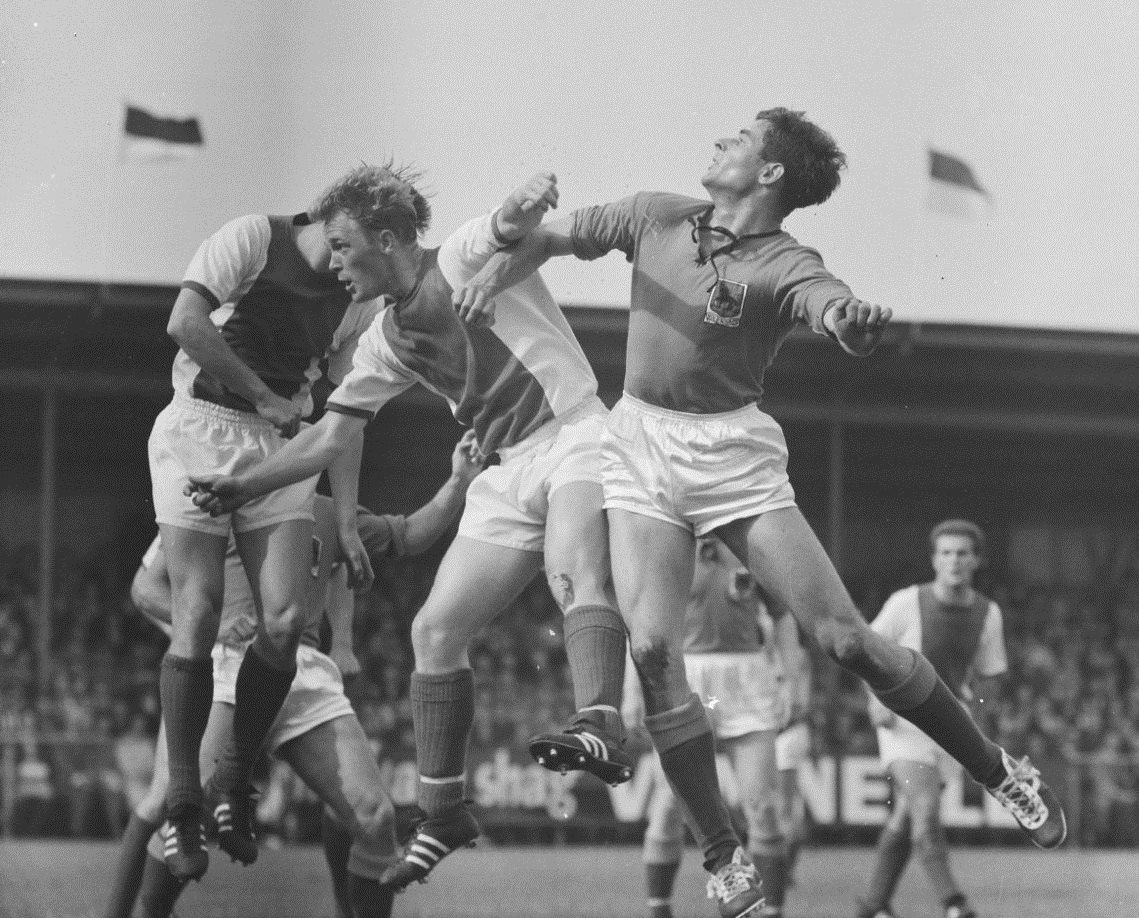 Volendam tegen Ajax 4-5, Smit kopt in, opspringend Tijm, daarachter Pronk